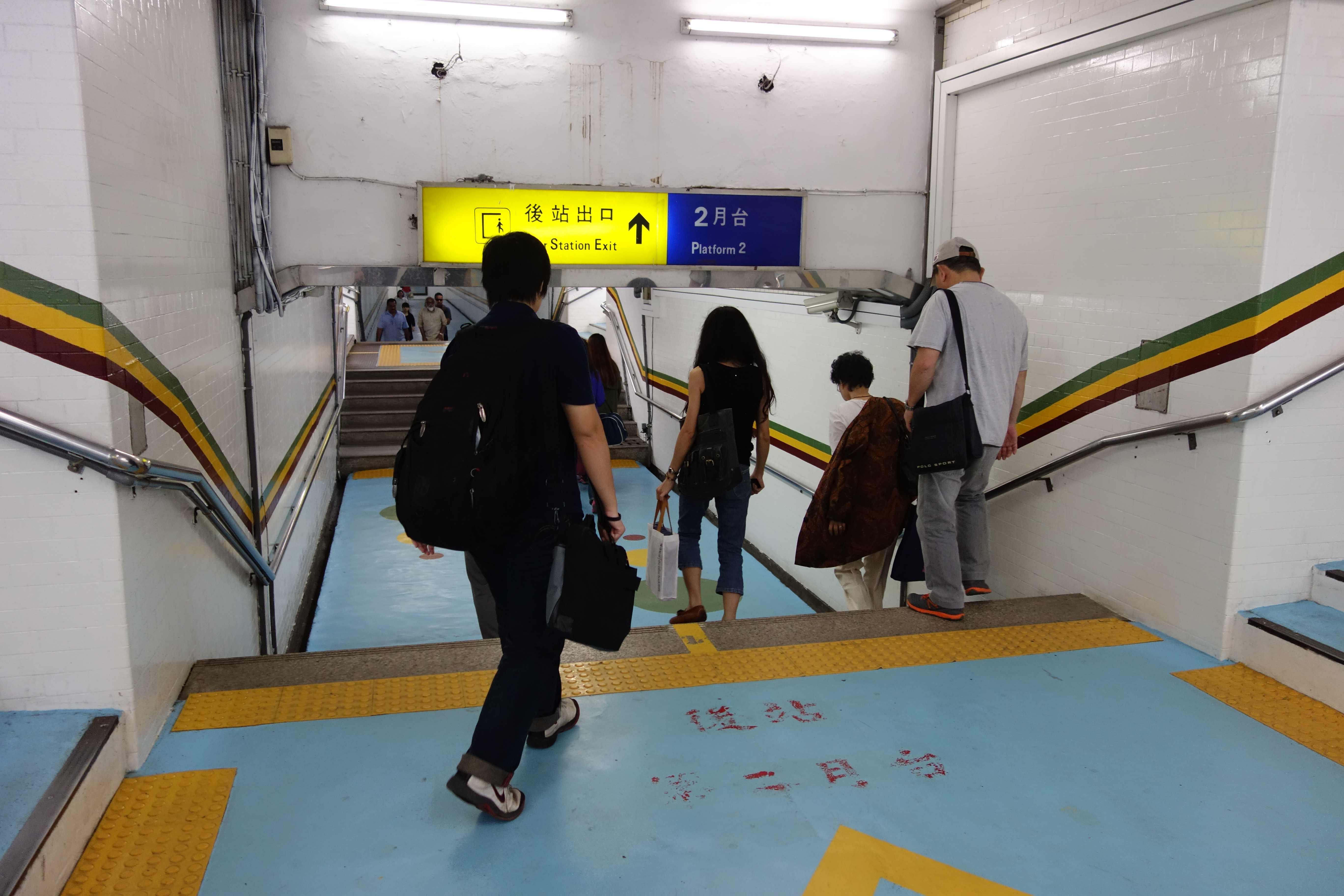 台鉄 台南駅 改札内地下通路 高低差があり、上り下りが続く